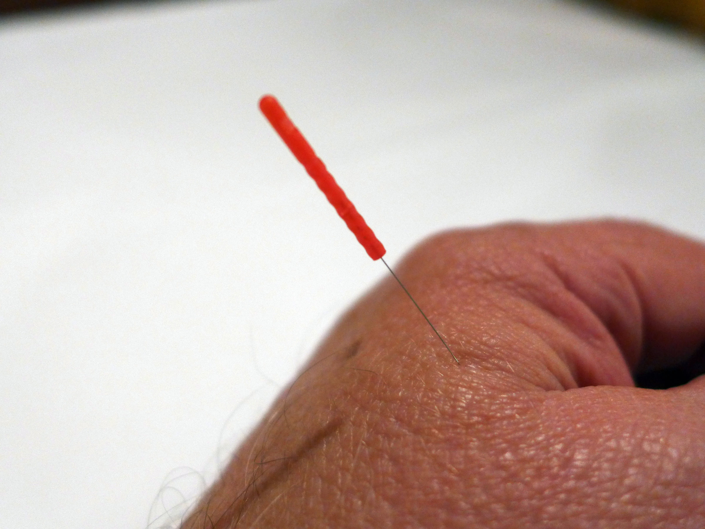 Akupunkturpunkt Di4